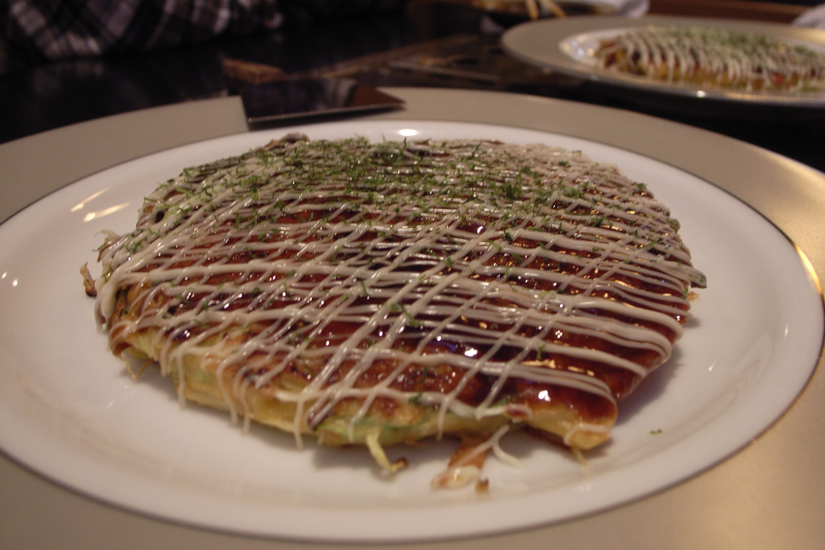 関西風お好み焼き